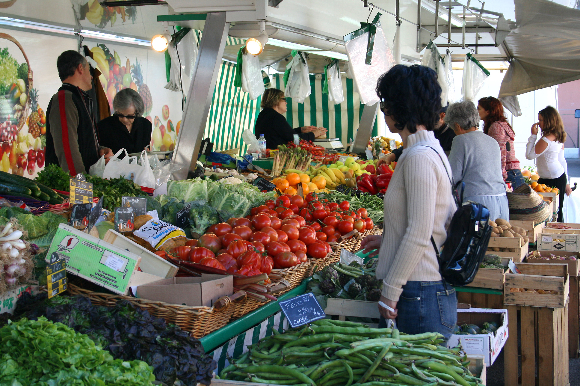 Ajaccio (Corse-du-Sud) - France, le marché.